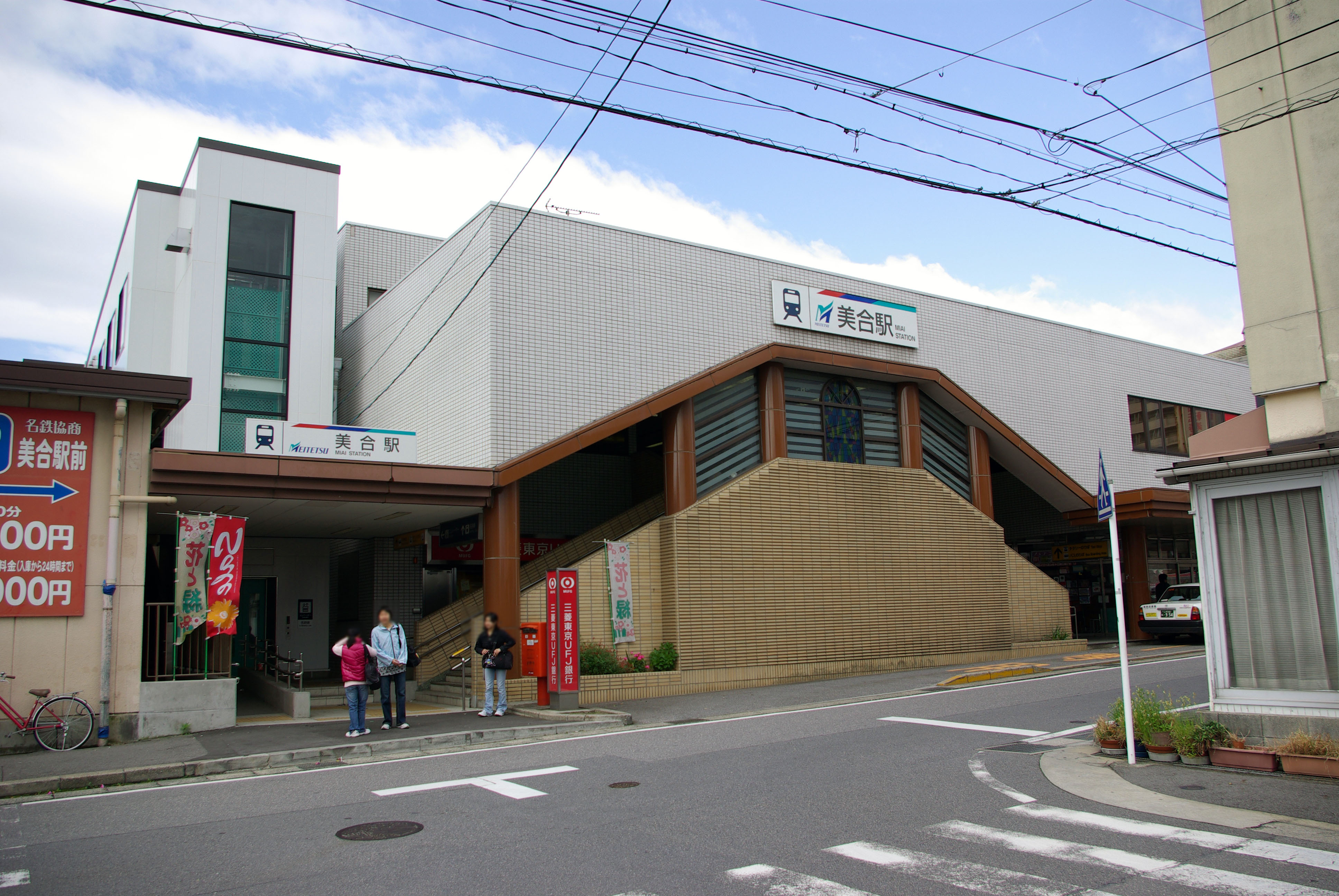 名鉄名古屋本線美合駅